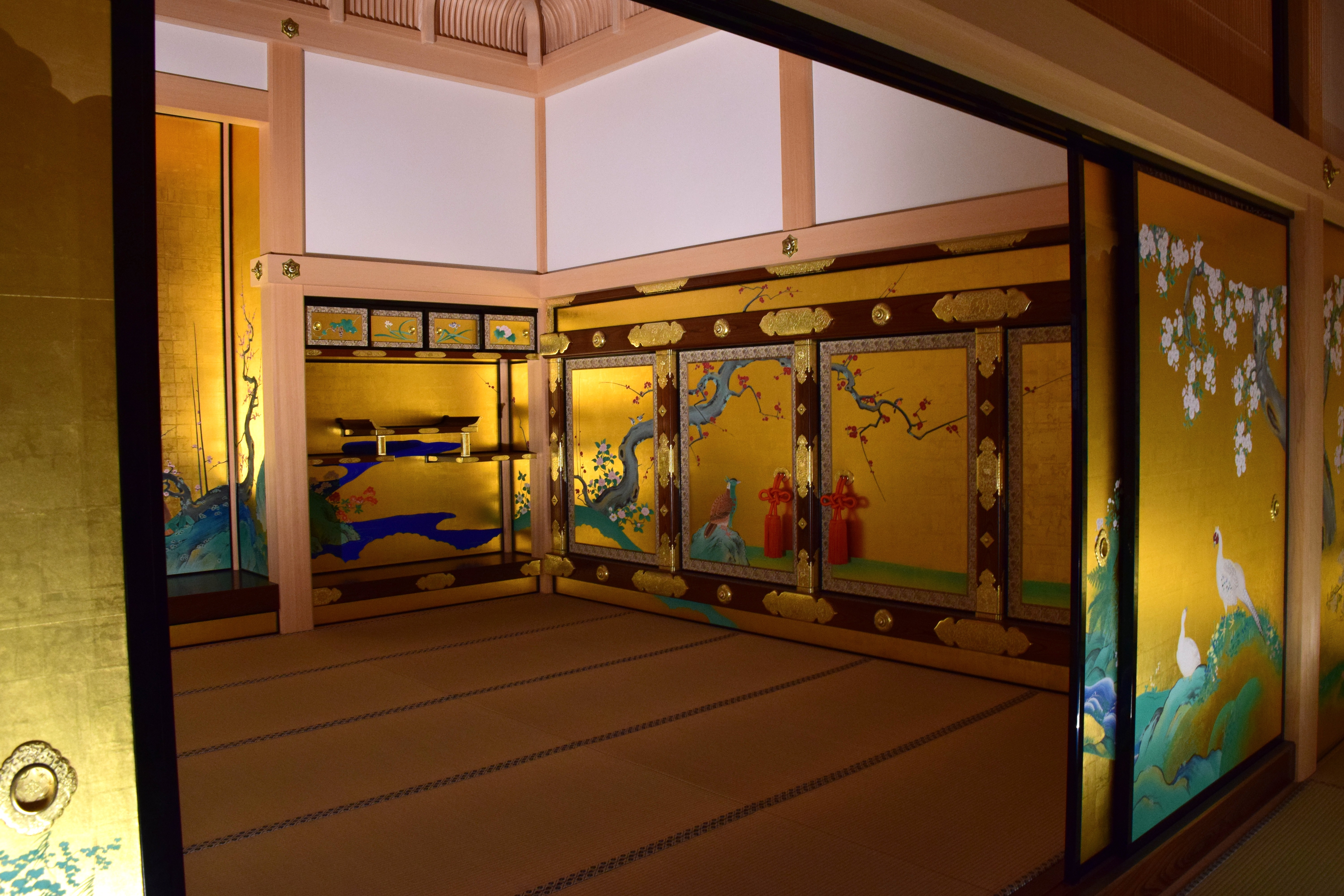 名古屋城本丸御殿